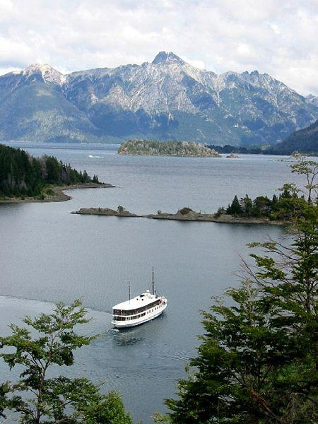 catamarán observado desde lo alto del acantilado de la Bahía Anchorena, en el centro de la Isla Victoria, Lago Nahuel Huapi, Argentina.